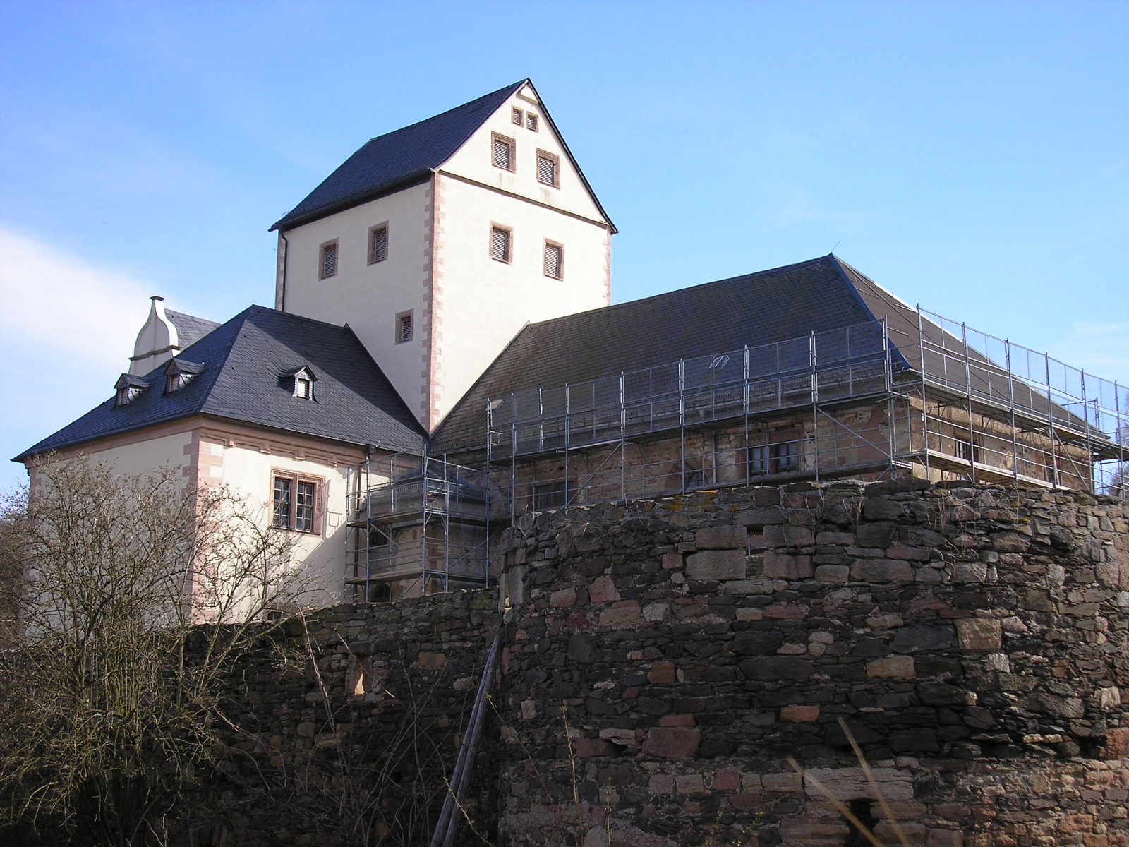 Das Kloster Mildenfurth bei Wünschendorf (Thüringen).